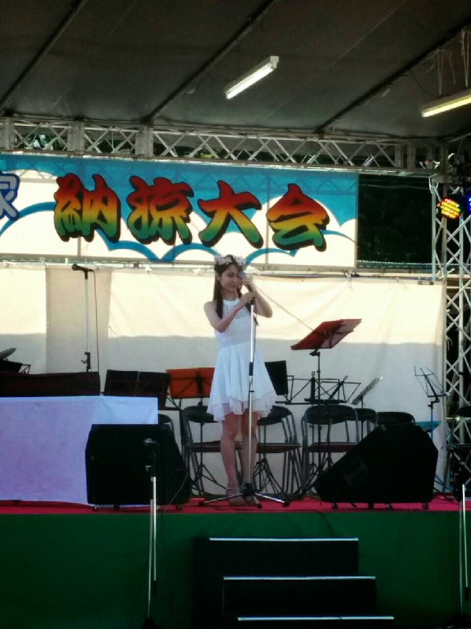 2015年7月18日に大分県別府市の社会福祉法人太陽の家で行われた納涼大会前、演奏の準備をするサラ・オレインさん。